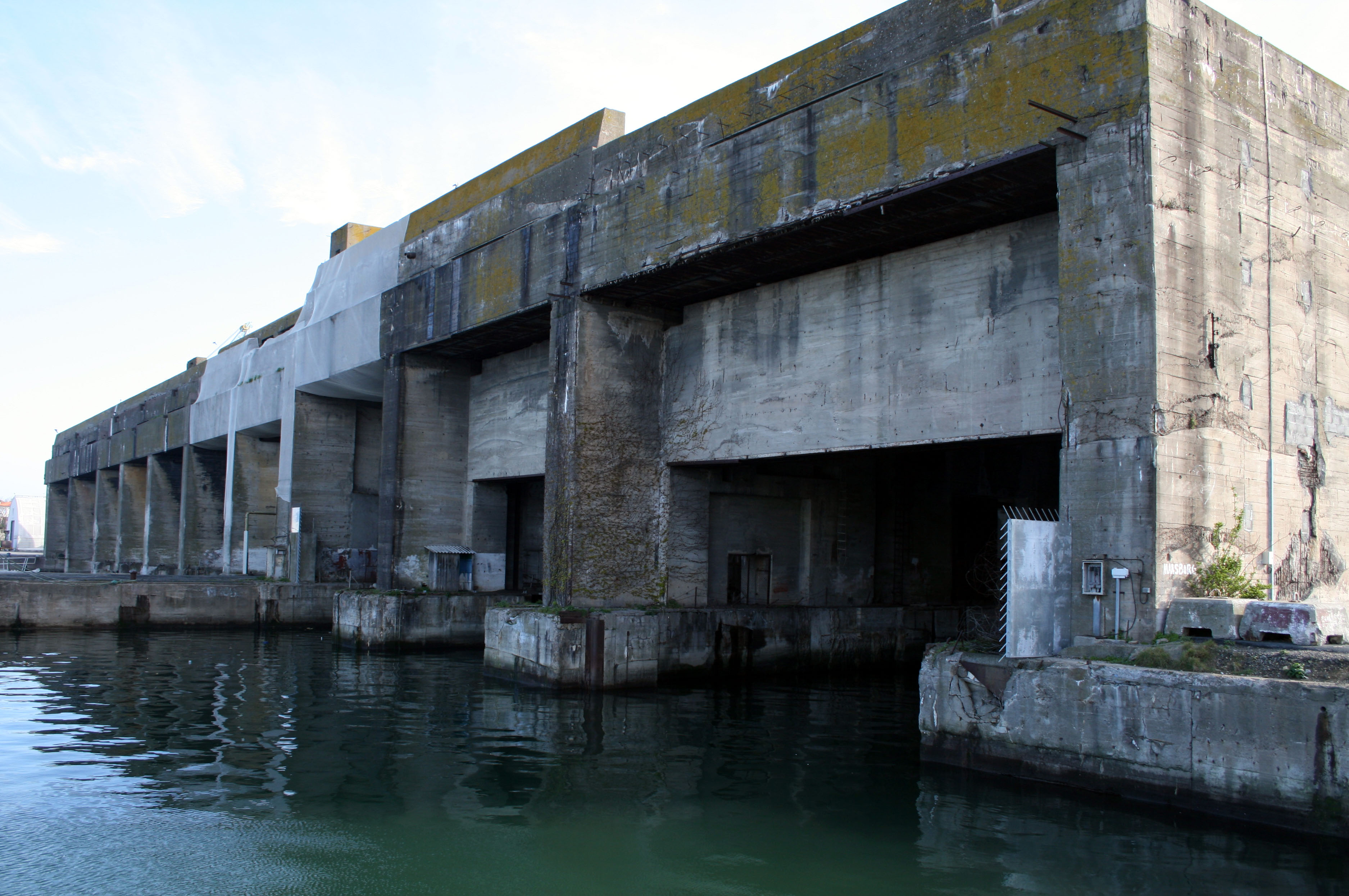 Base sous-marine de la Rochelle